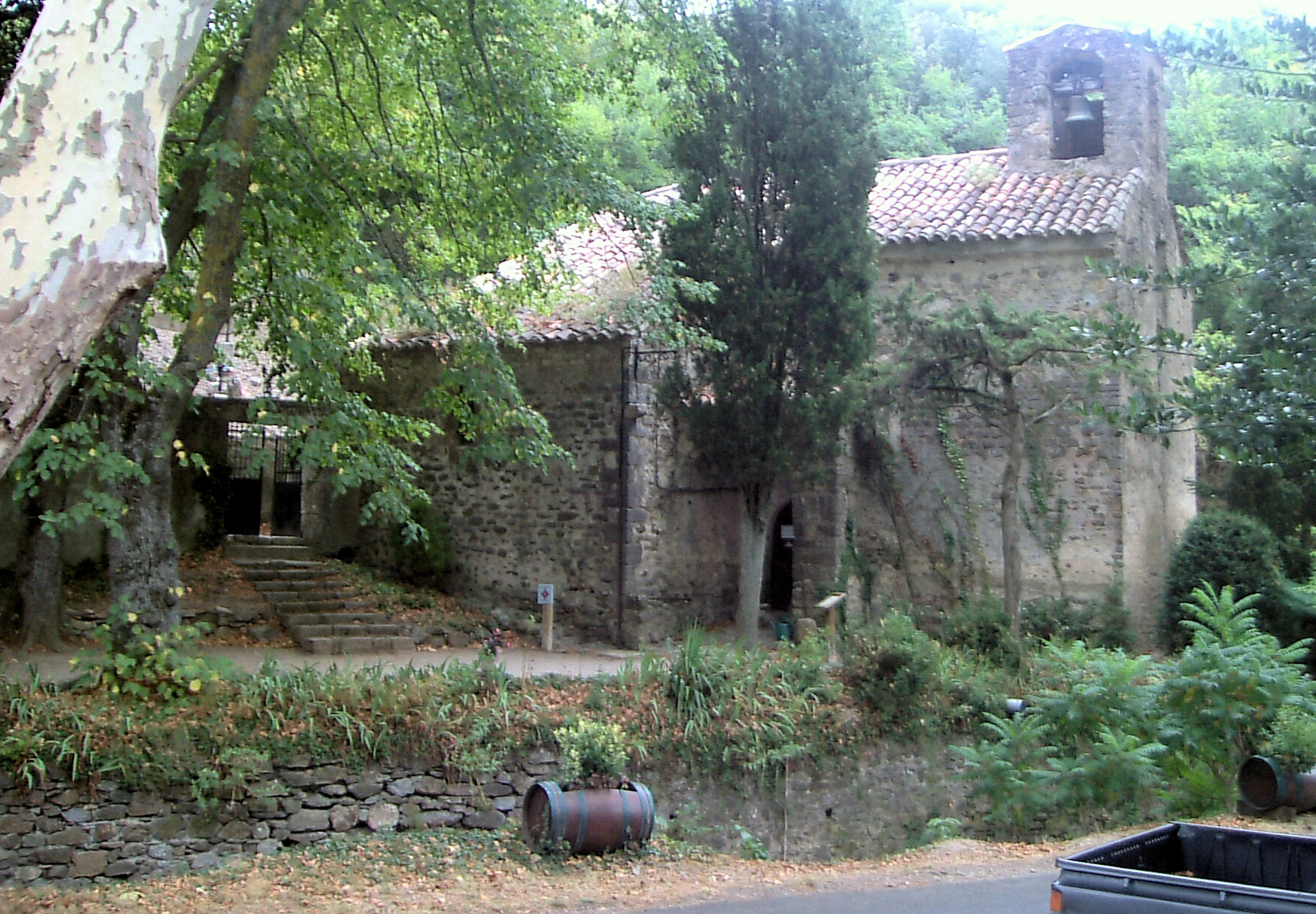 L'église Saint-Saturnin à Palairac